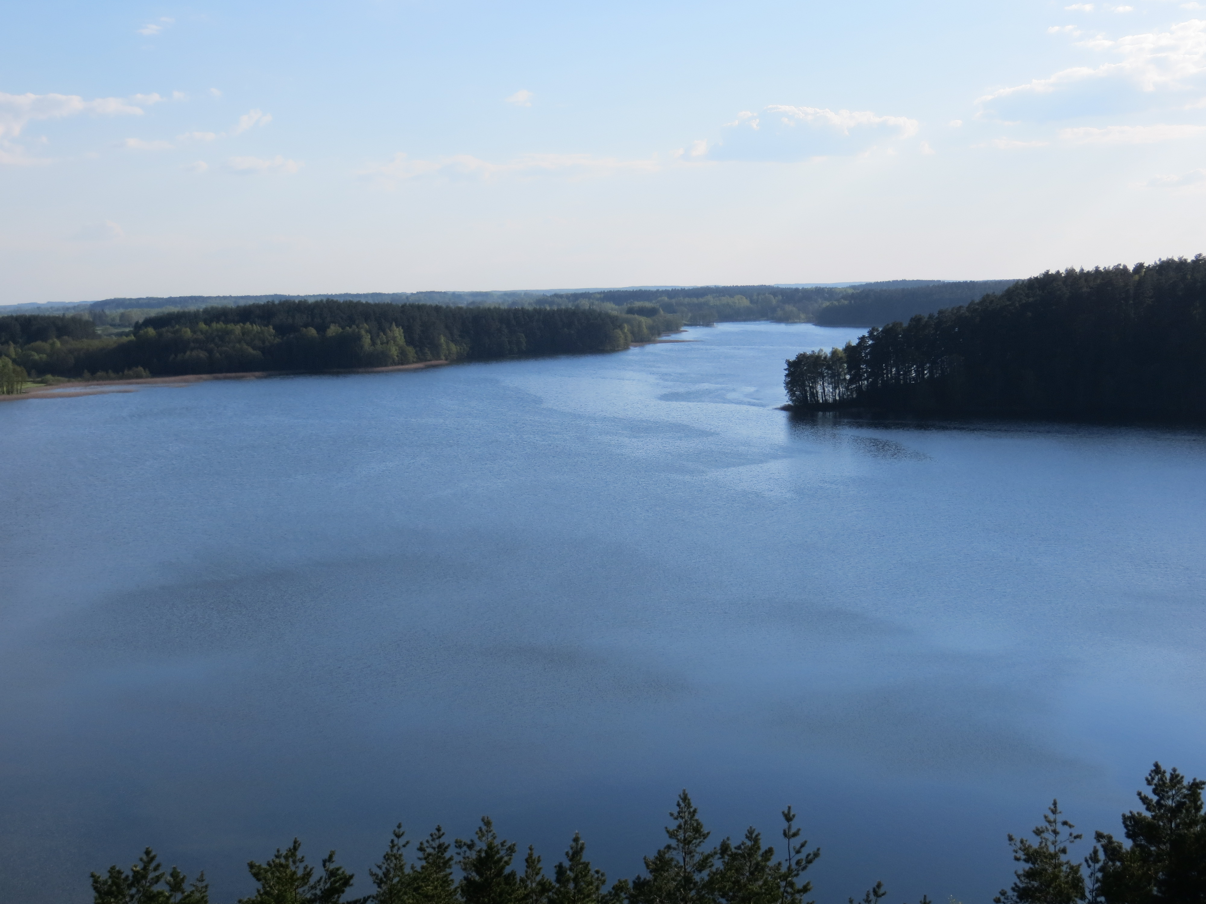 Mindūnų sen., Lithuania